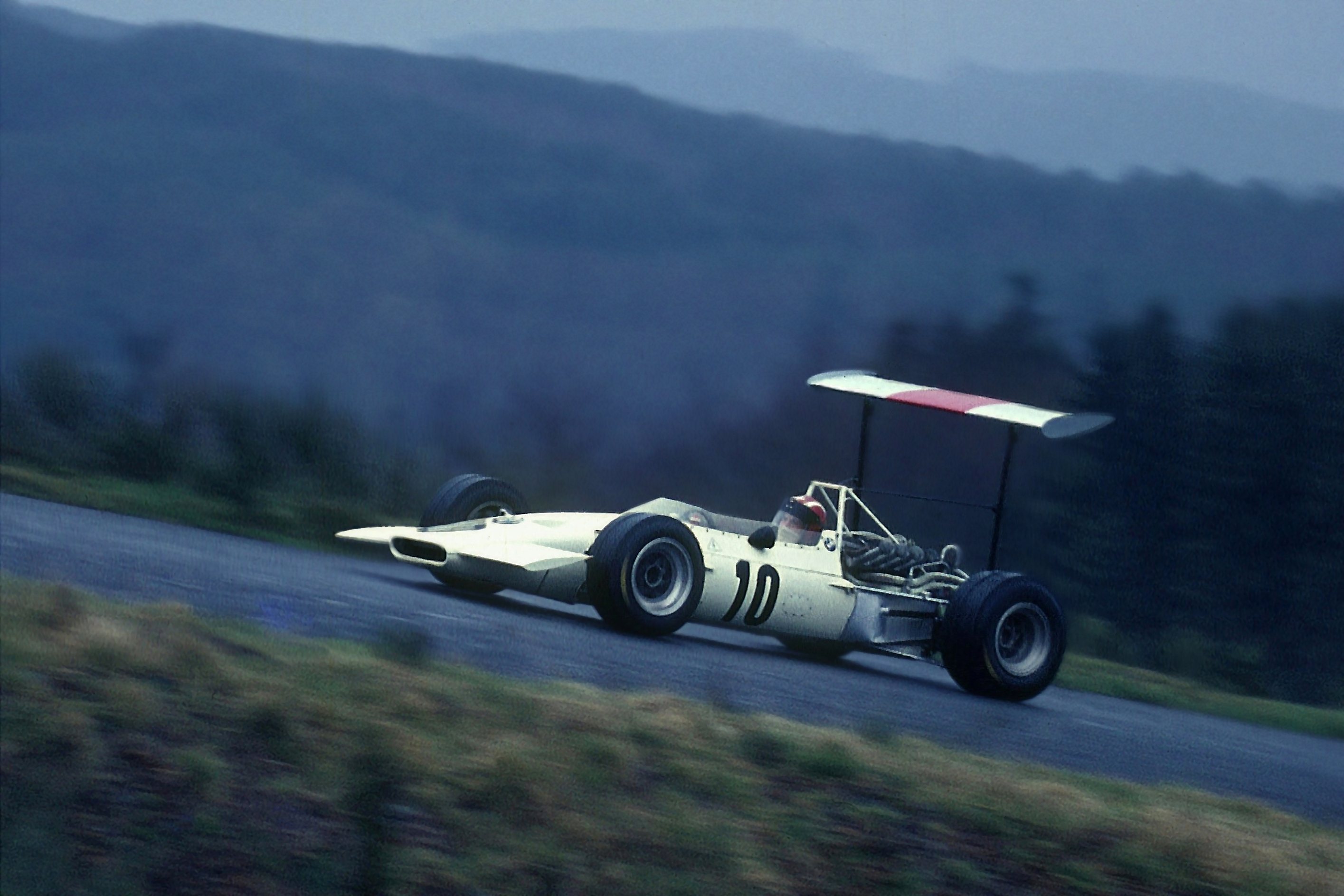 Joseph Siffert im Formel 2 Lola T102/BMW beim Training zum Eifelrennen auf dem Nürburgring am 26. April 1969